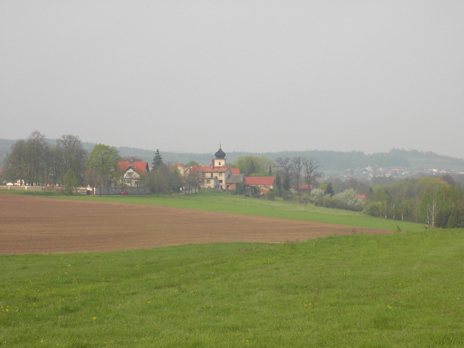 Panorama Višňové, okres Příbram.